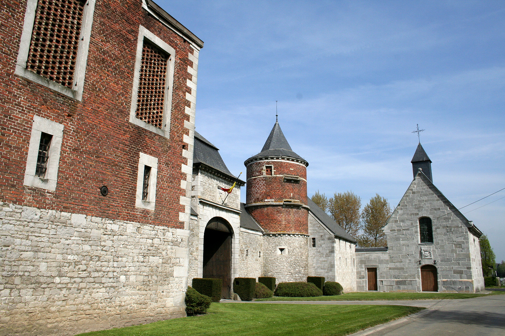 Warnant-Dreye, le château d'Oultremont et sa chapelle (XVII/XVIIIe siècles).